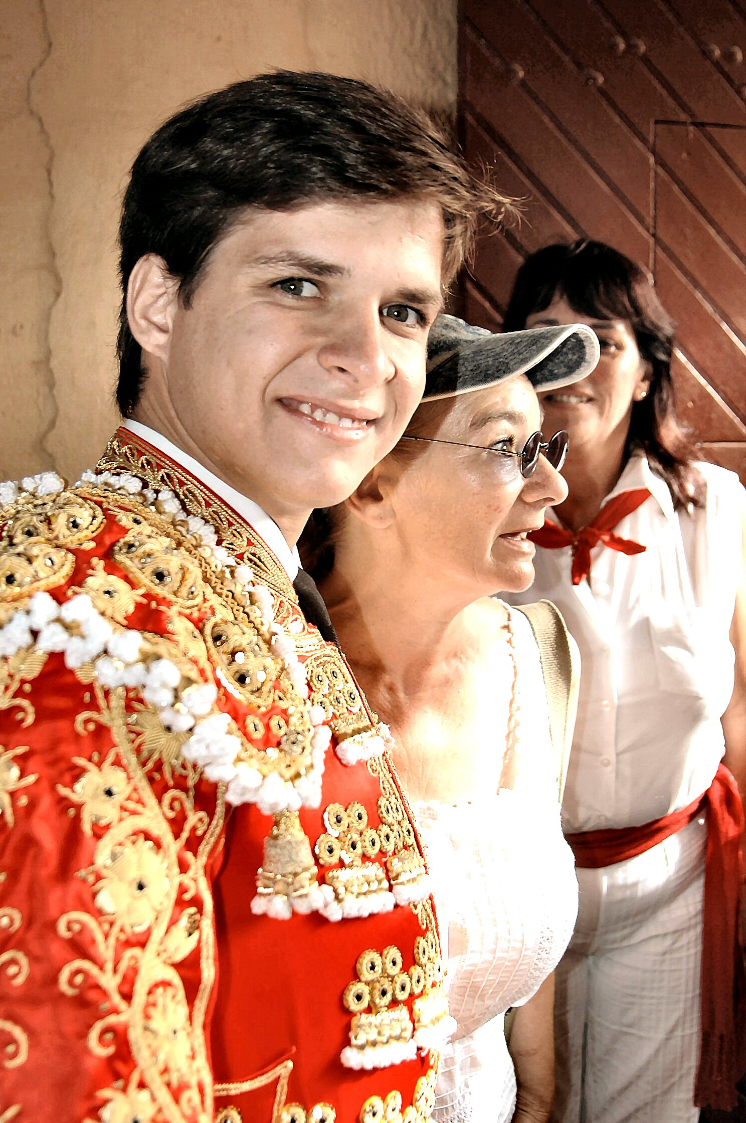 El Juli, Sortie de la Chapelle, Bayonne 5 Septembre 2004